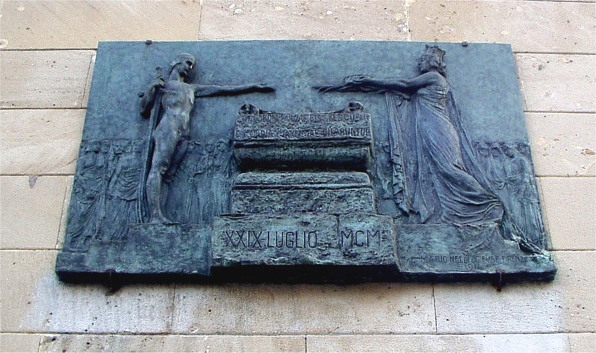 Propileo destro della Cappella espiatoria in Monza: targa dedicatoria in bronzo scolpita dal romano Carlo Fontana con la data del regicidio: 29 Luglio 1900 e "Mario Nelli fuse in Firenze 1914"; il bassorilievo rappresenta l'Italia che consegna la Corona Ferrea alle nuove generazioni. La targa fu scoperta il 29 luglio 1914